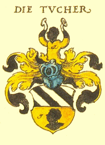 Wappen der Nürnberger Patrizierfamilie Tucher von Simmelsdorf